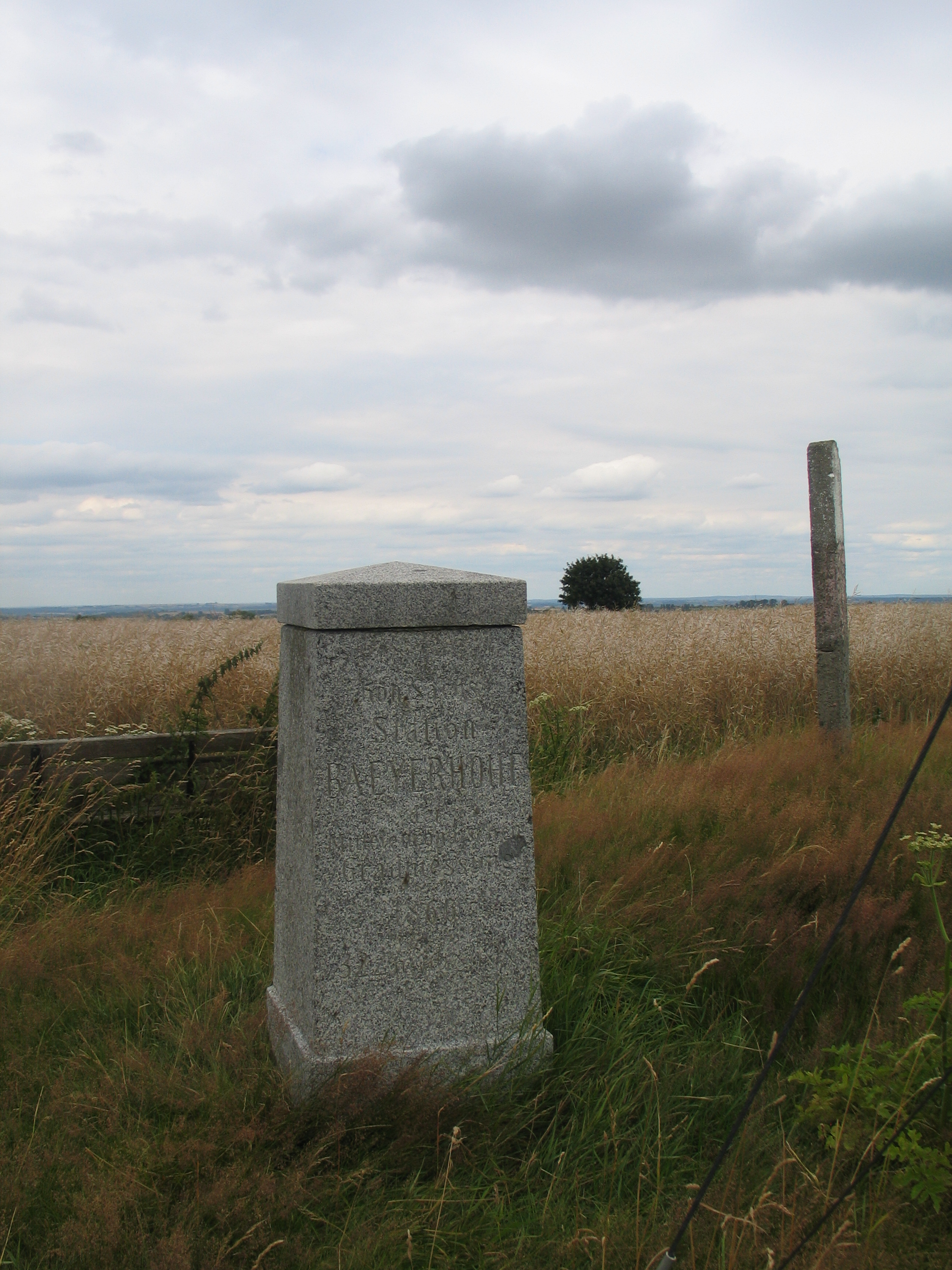 Auf der Baeyerhöhe, der höchsten Erhebung des Landkreises Meißen.